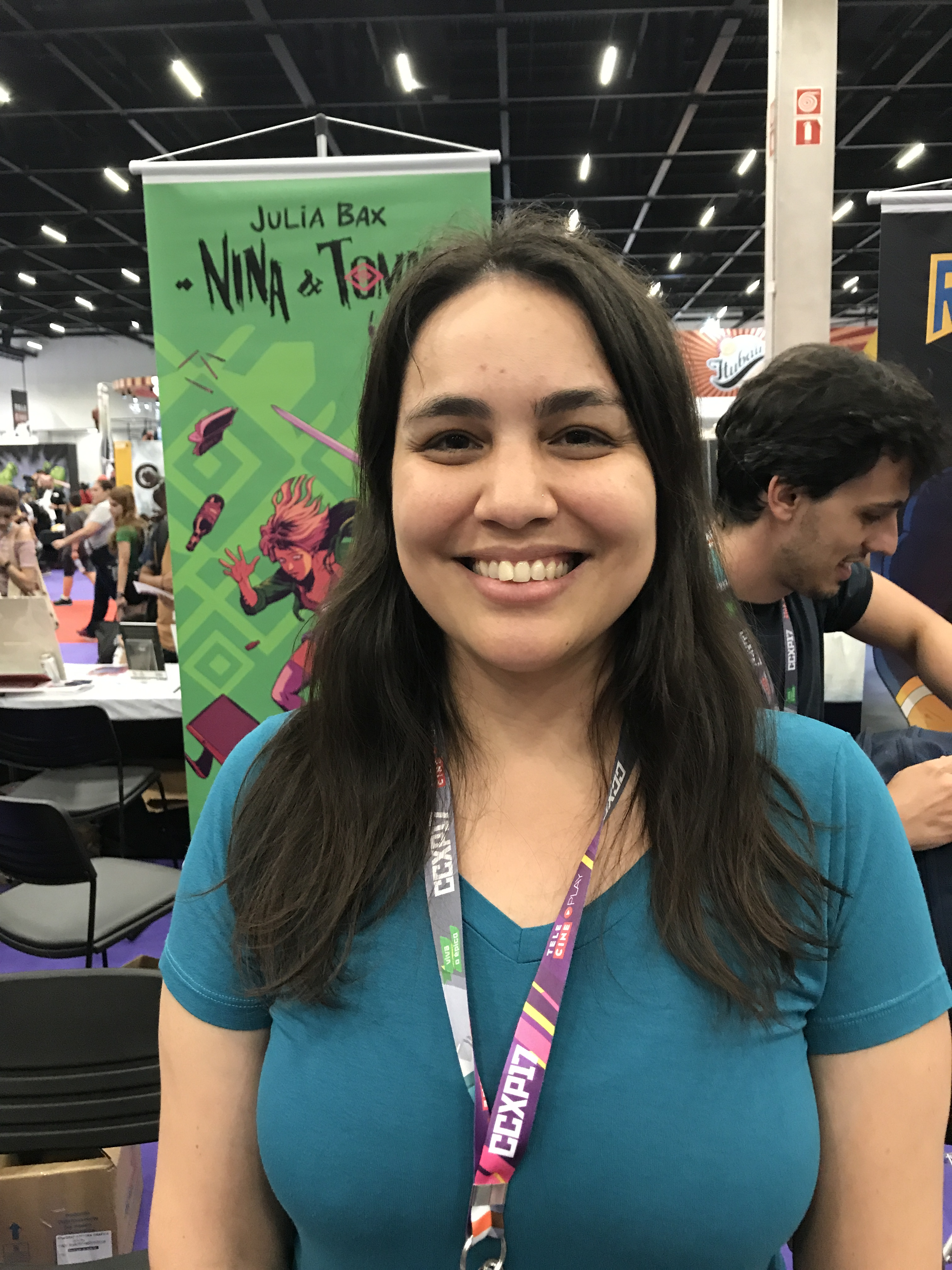 Artista Julia Bax na edição de 2017 da Comic Con Experience